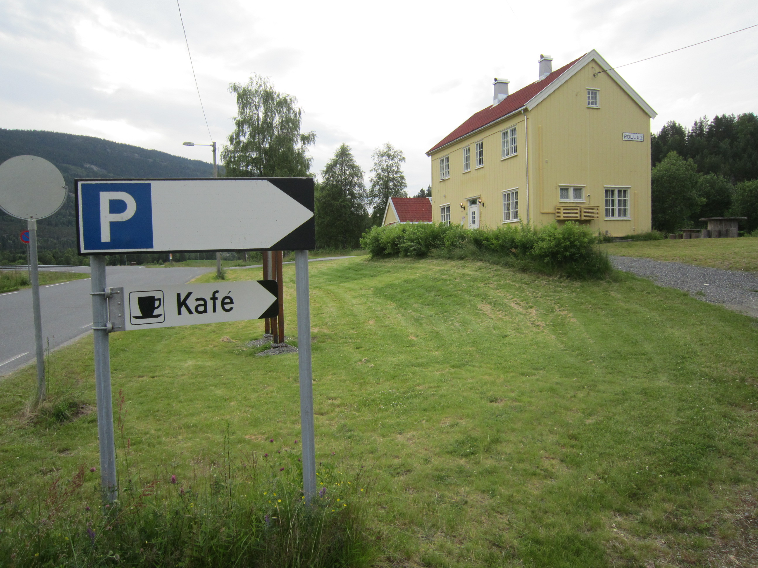 Vrågåvegen (fylkesvei 106) forbi Rollag stasjon på Numedalsbanen